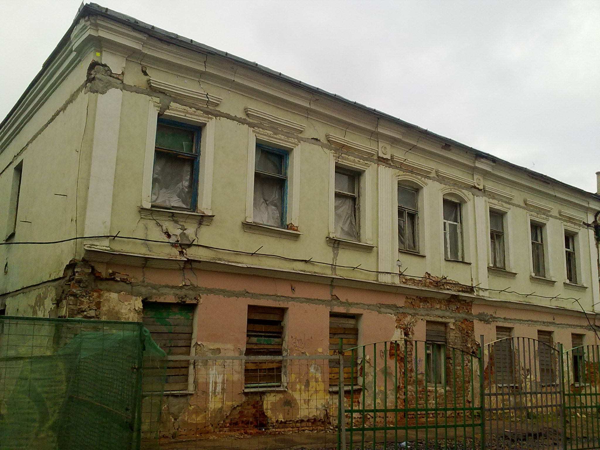 Мінск. вуліца Рэвалюцыйная. 2012